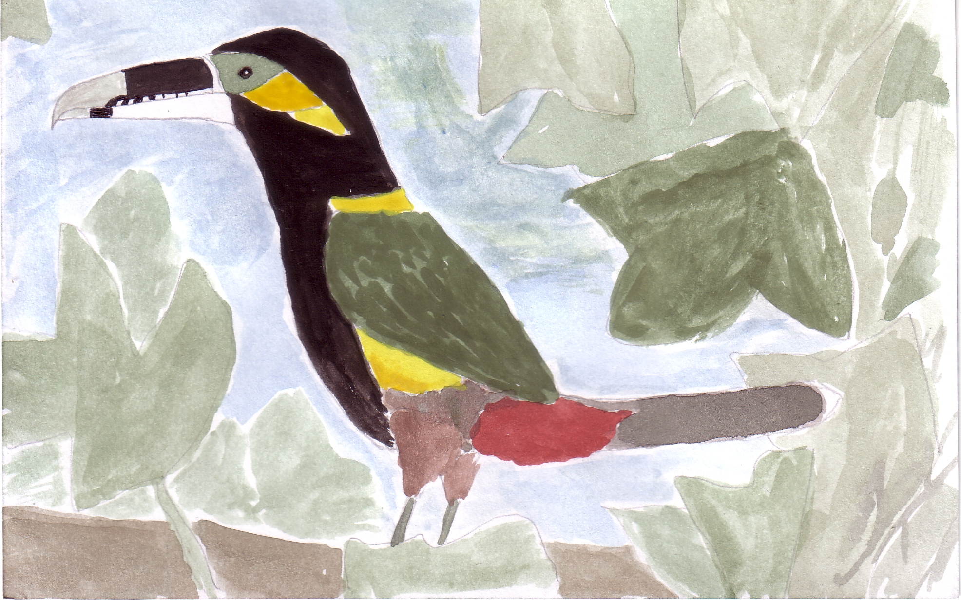 desegnaĵo de gulda tukaneto (selenidera gouldii)